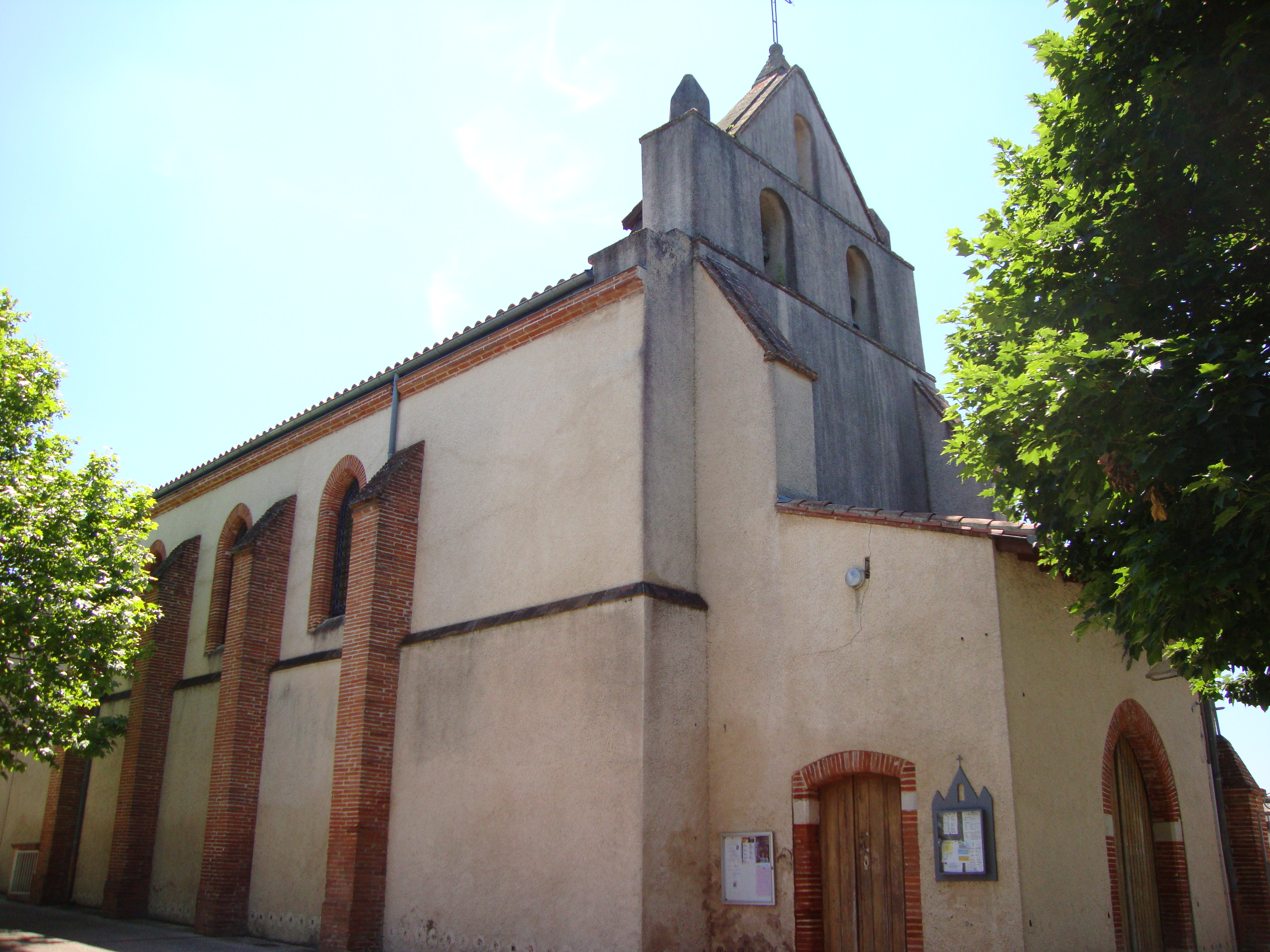 La Salvetat-Saint-Gilles (Haute-Garonne, France) : L'église vue de la rue.